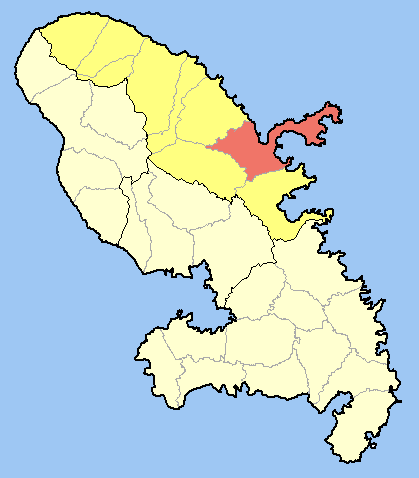 Location of La Trinité within Martinique